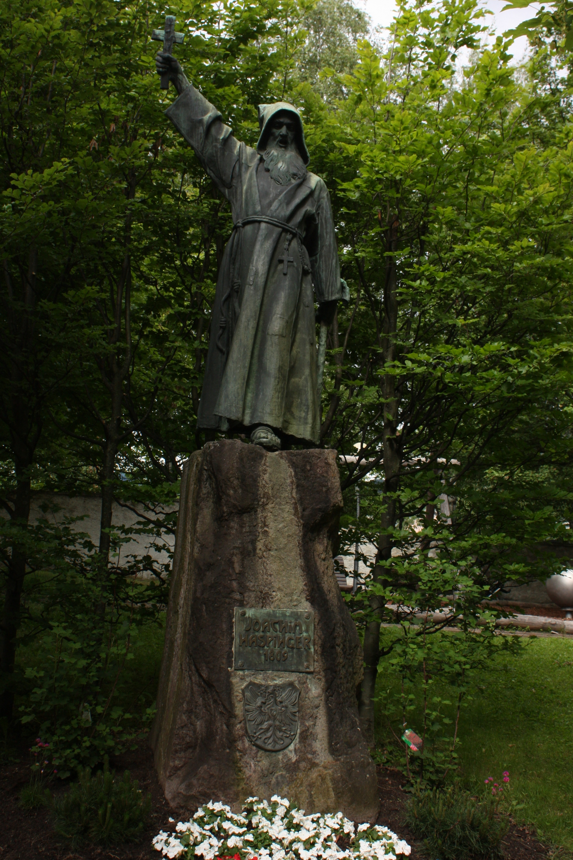 Klausen, Südtirol: Denkmal für Joachim Haspinger